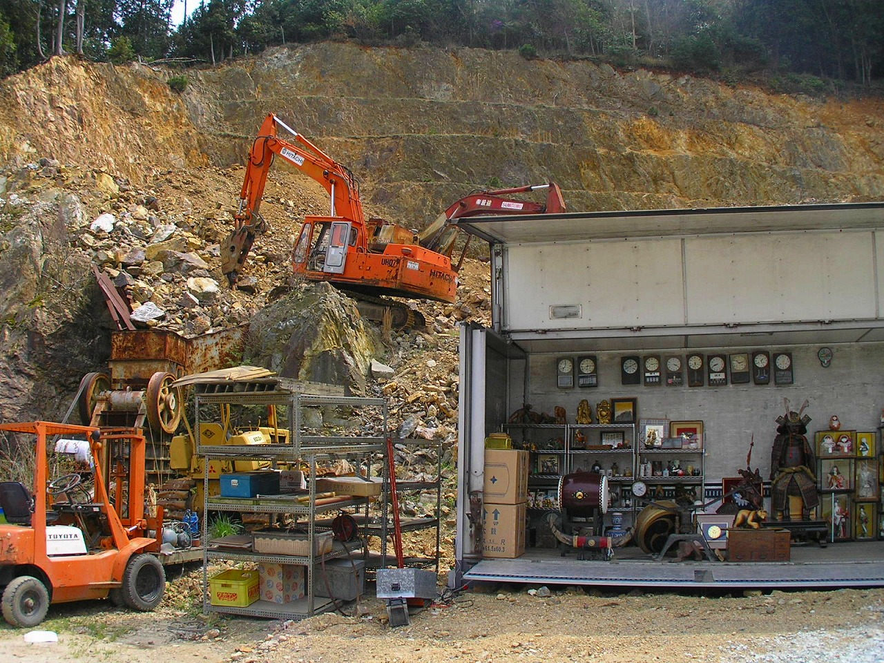 土砂採石場跡のリサイクルショップ